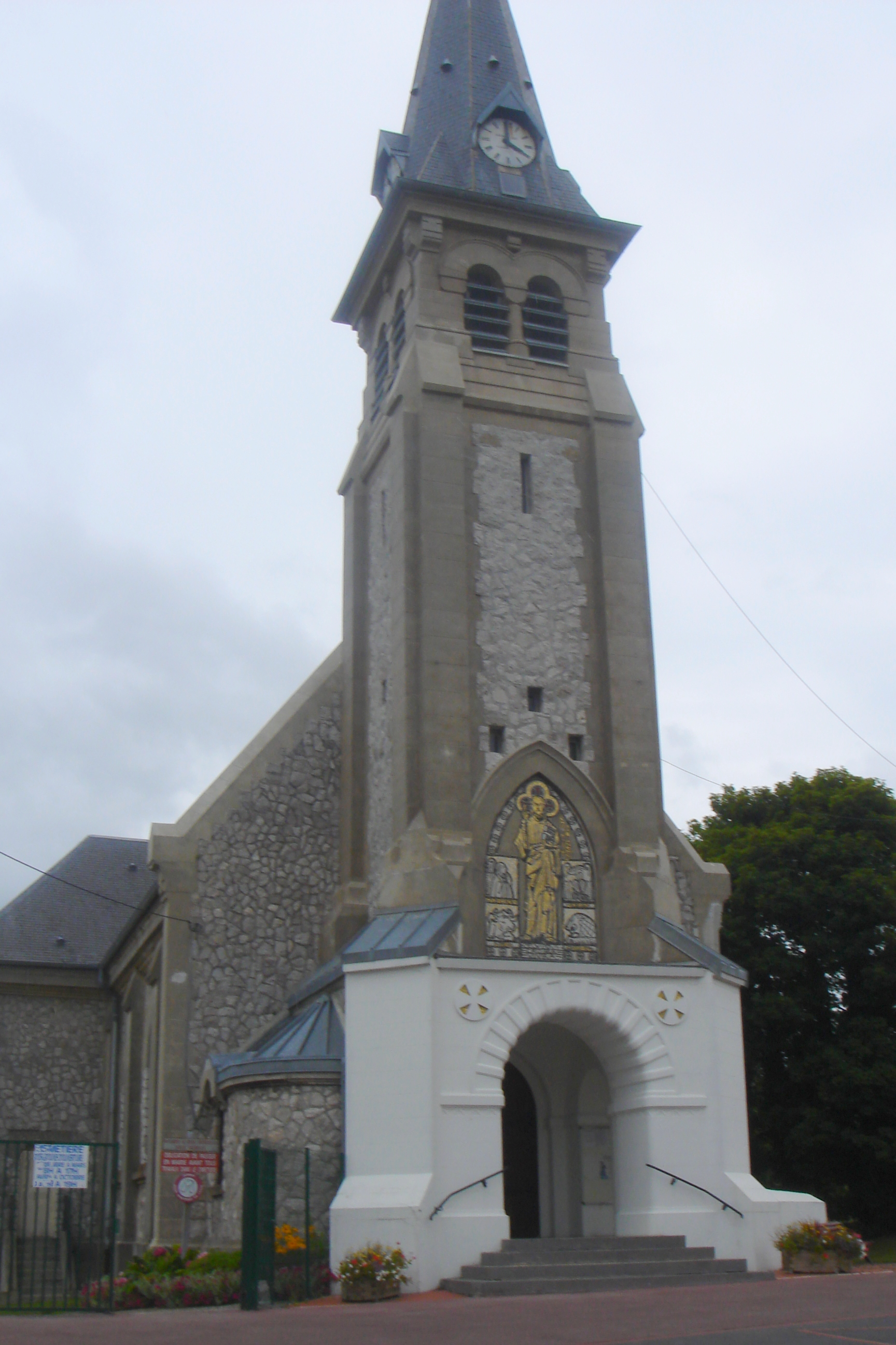 Église de Camiers